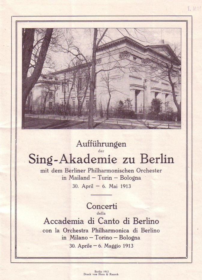 Aufführungen der Sing-Akademie zu Berlin mit dem Berliner Philharmonischen Orchester in Mailand, Turin, Bologna, 30. April - 6. Mai 1913